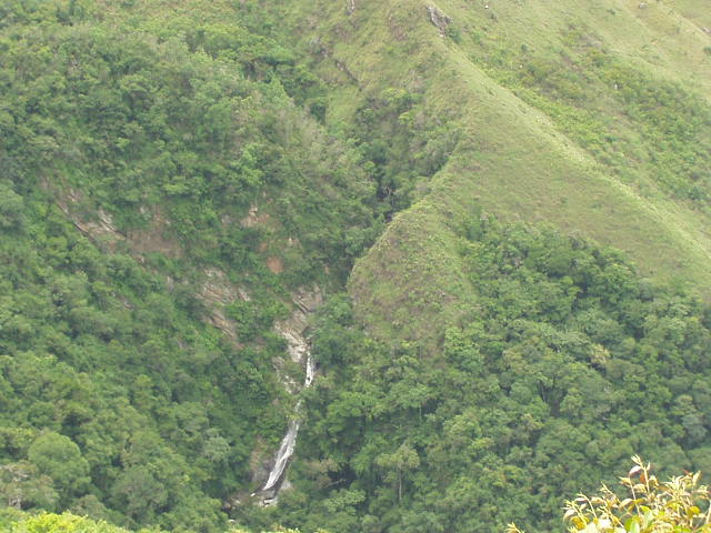 Tocomo River. Caracas, Venezuela.